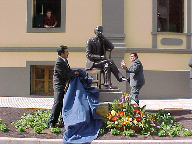 Descubrimiento estatua Manuel Velázquez Cabrera